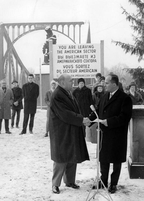 Glienicker Brücke, Ernst Lemmer, Rainzer Barzel Minister Dr. Barzel und sein Vorgänger Lemmer zur Jahreswende an der Glienicker Brücke Minister Dr. Rainer Barzel und sein Amtsvorgänger Ernst Lemmer trafen sich am 29. Dezember 1962 an der Zonengrenze an der Glienicker Brücke. Dr. Barzel und Ernst Lemmer sprachen vor der Fernsehkamera des Senders Freies Berlin zu der Bevölkerung der Sowjetzone und der Bundesrepublik. Für die Fernsehzuschauer übergab Ernst Lemmer seinem Nachfolger Dr. Barzel sein Ministeramt an der Glienicker Brücke. Minister Dr. Barzel dankte seinem Vorgänger für seine Arbeit und die Sympathien, die er sich während seiner Amtszeit erworben hatte. Fotograf: Joachim G. Jung - Bildjournalist - Abgebildete Personen: Lemmer, Ernst: Bundesminister für gesamtdeutsche Fragen, CDU, Journalist, Bundesrepublik Deutschland Barzel, Rainer Dr.: Bundesvorsitzender der CDU, Minister für Gesamtdeutsche Fragen, Bundesrepublik Deutschland (GND 118652990)